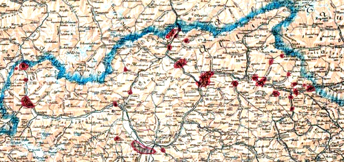 immagine dell'altoa dige sbarrato